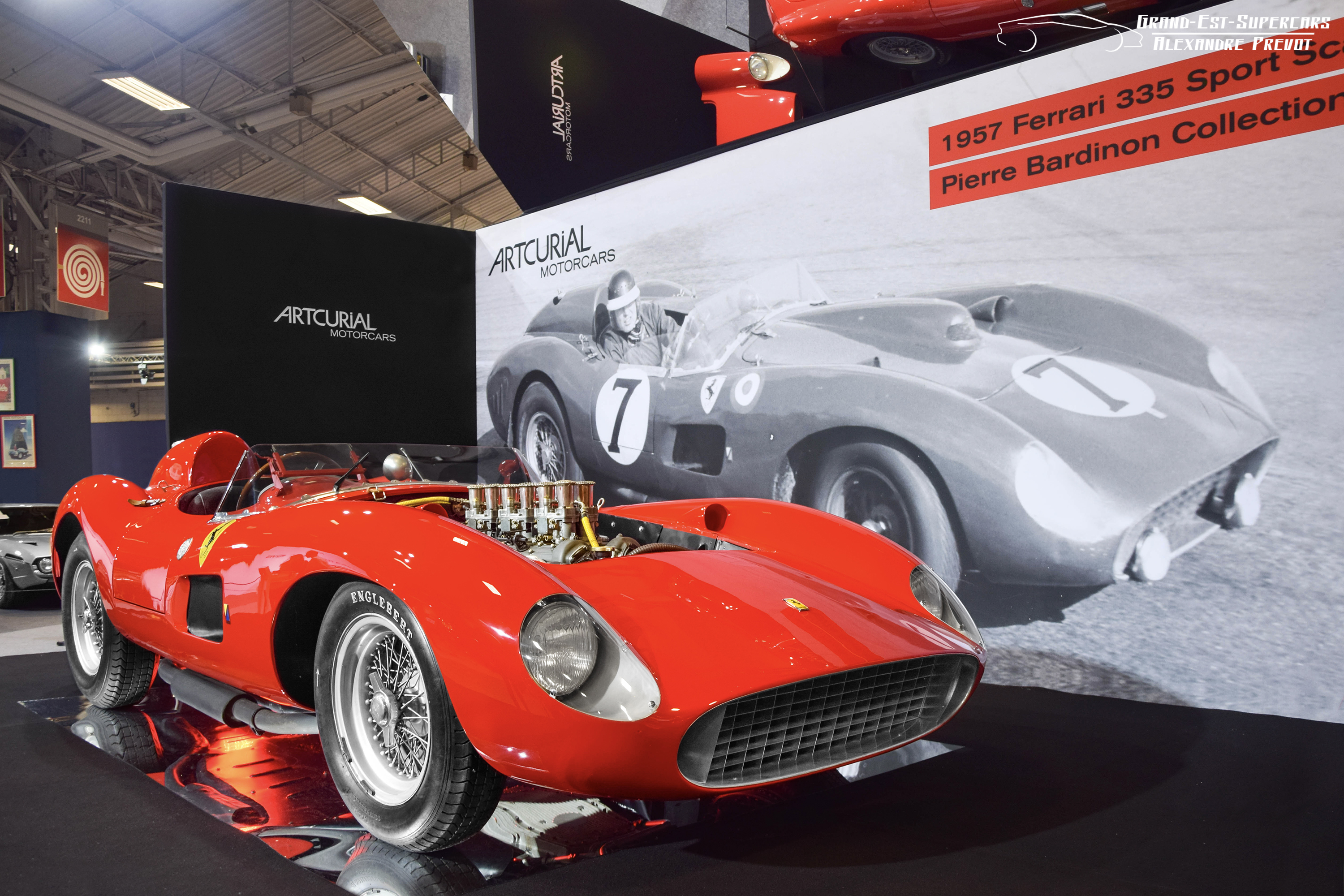 Année du modèle présenté : 1957 Carrosserie : Scaglietti Châssis type 520/B : n°0674 Moteur type 141 : n°0674 Numéro interne : 2 Proposée à la vente par la maison Artcurial en 2016, estimée entre 28 000 000 - 32 000 000 €. Vendue pour 32 075 200 €.